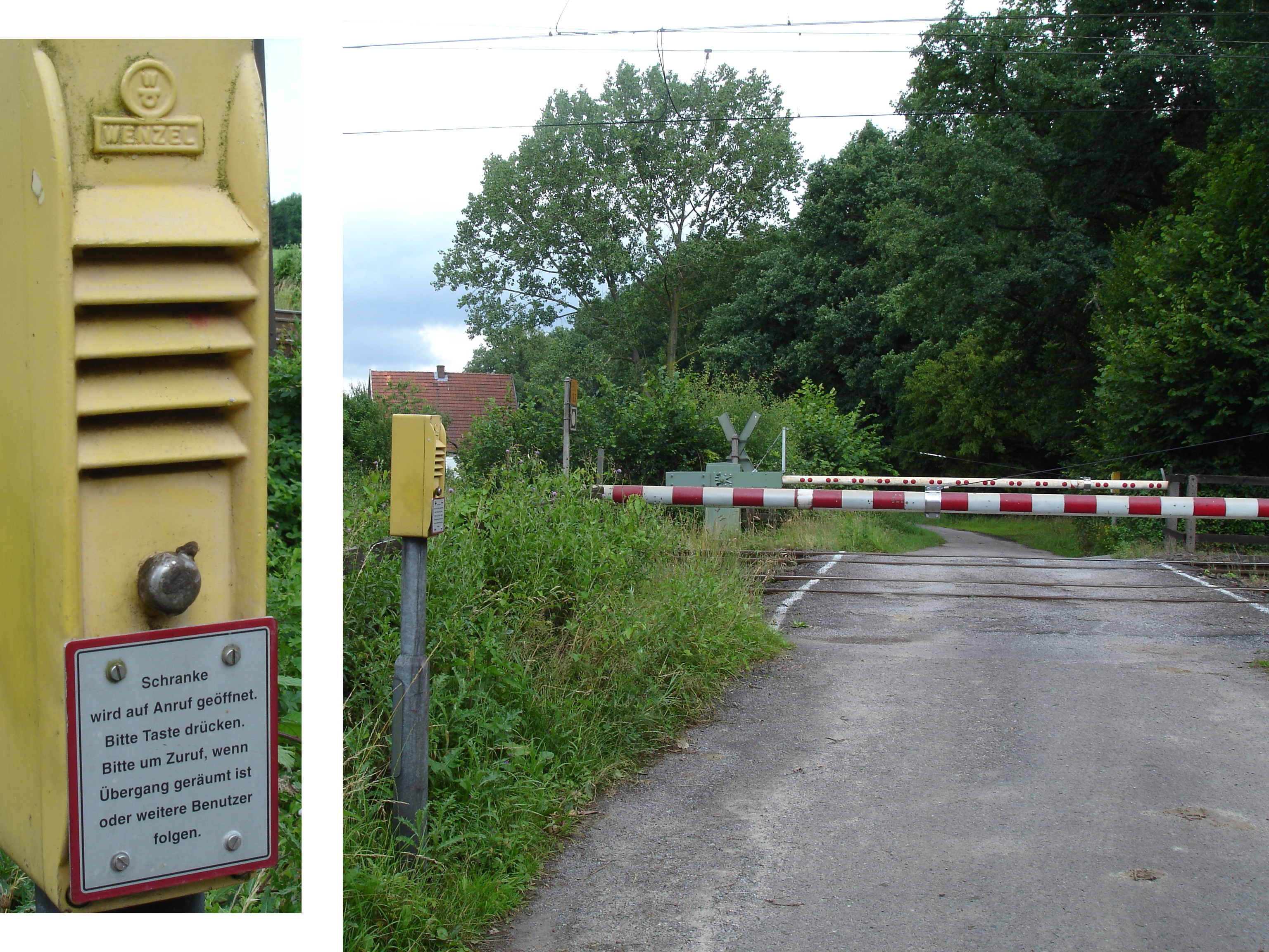 Anrufschranken near Bad Bentheim